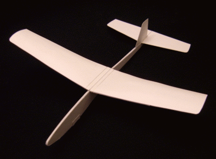 Papierflieger N-424, Design Yasuaki Ninomiya